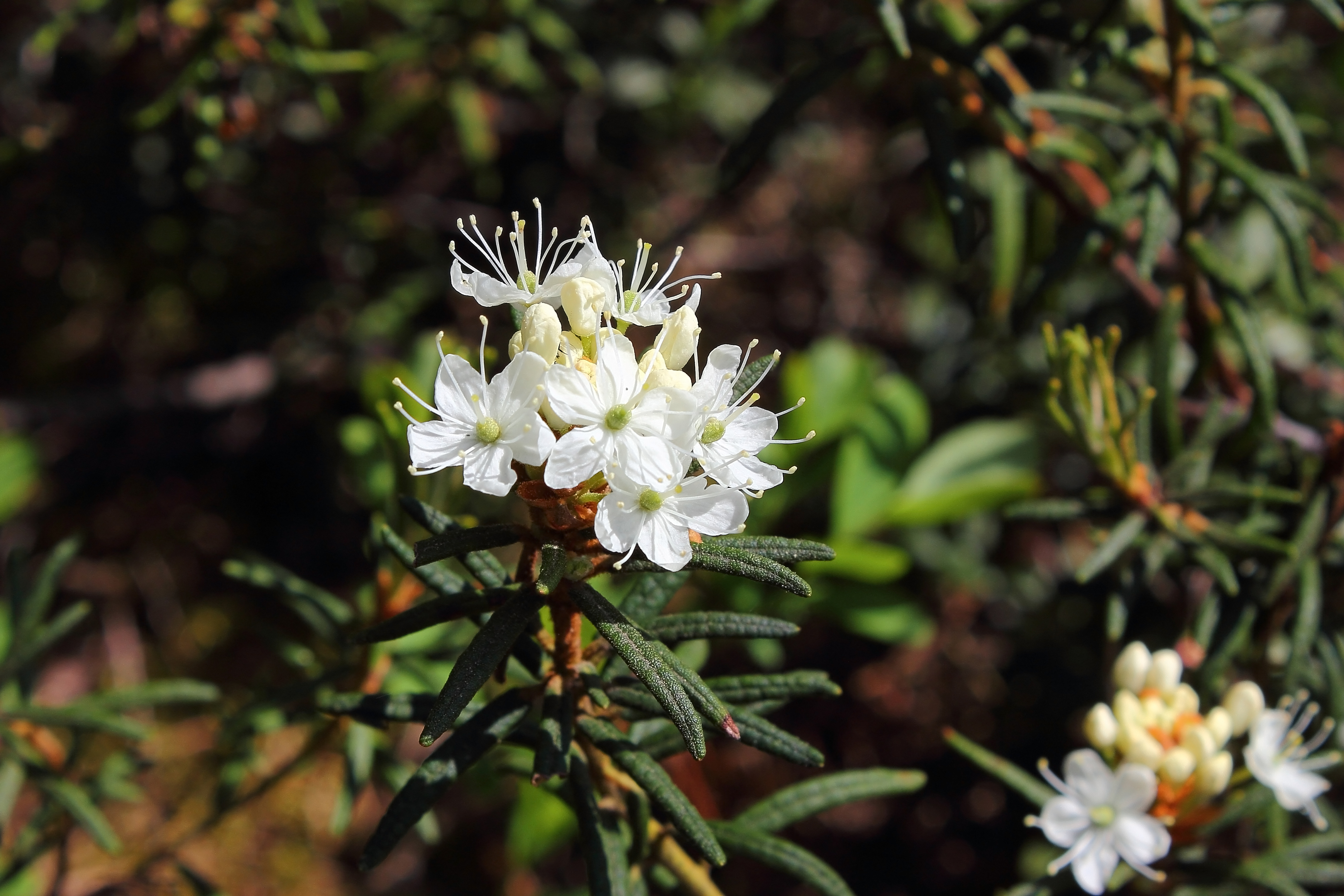 Das Rottalmoos liegt südwestlich von Litschau auf rund 542 Meter Seehöhe und erstreckt sich über eine Fläche von 10,86 Hektar. In dem seit 1999 zum Naturschutzgebiet erklärten Hochmoor wachsen viele gefährdete Pflanzen, etwa der Sumpfporst. This media shows the nature reserve in Lower Austria with the ID 46.